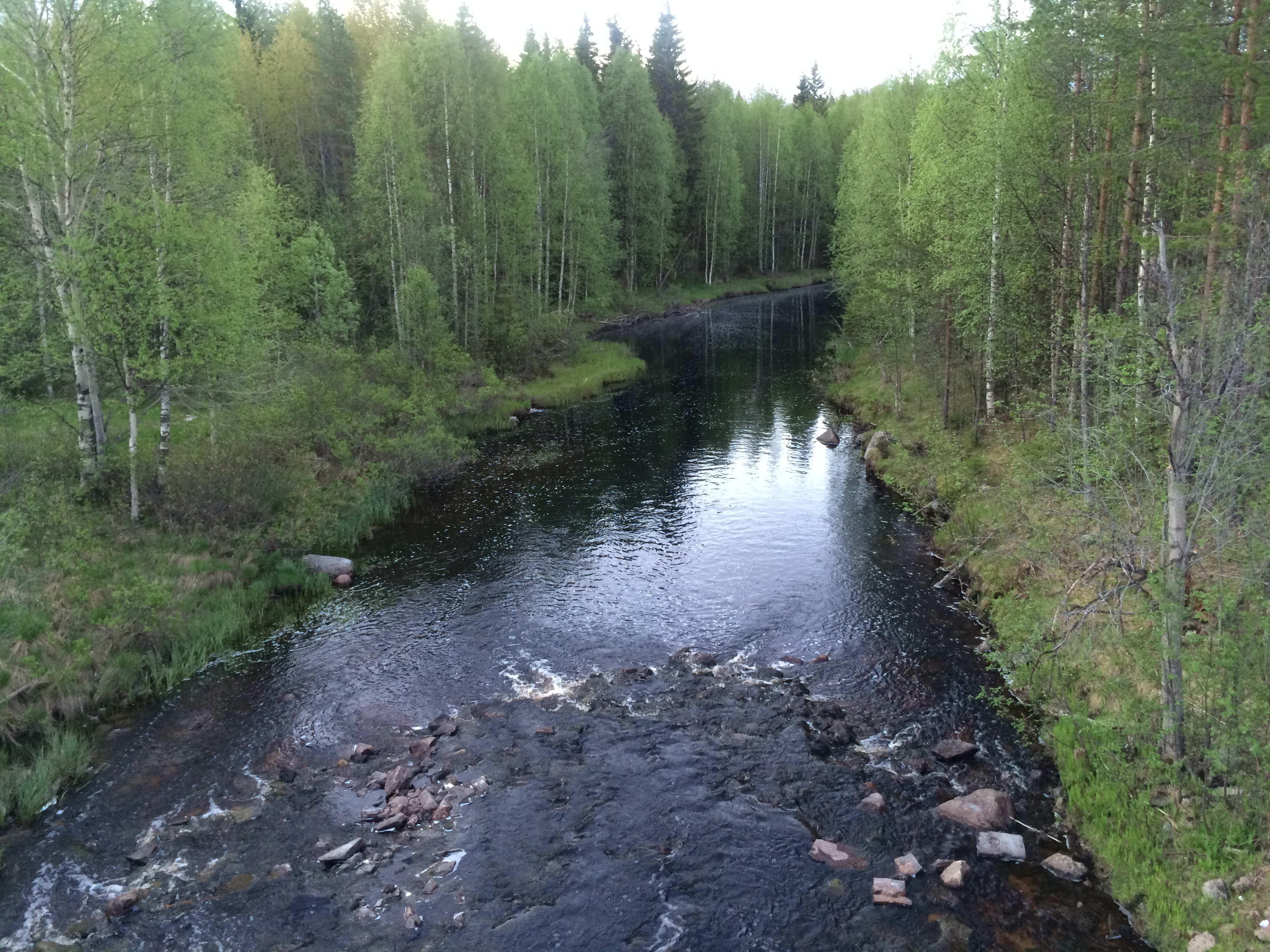 Олонга (Карелия)